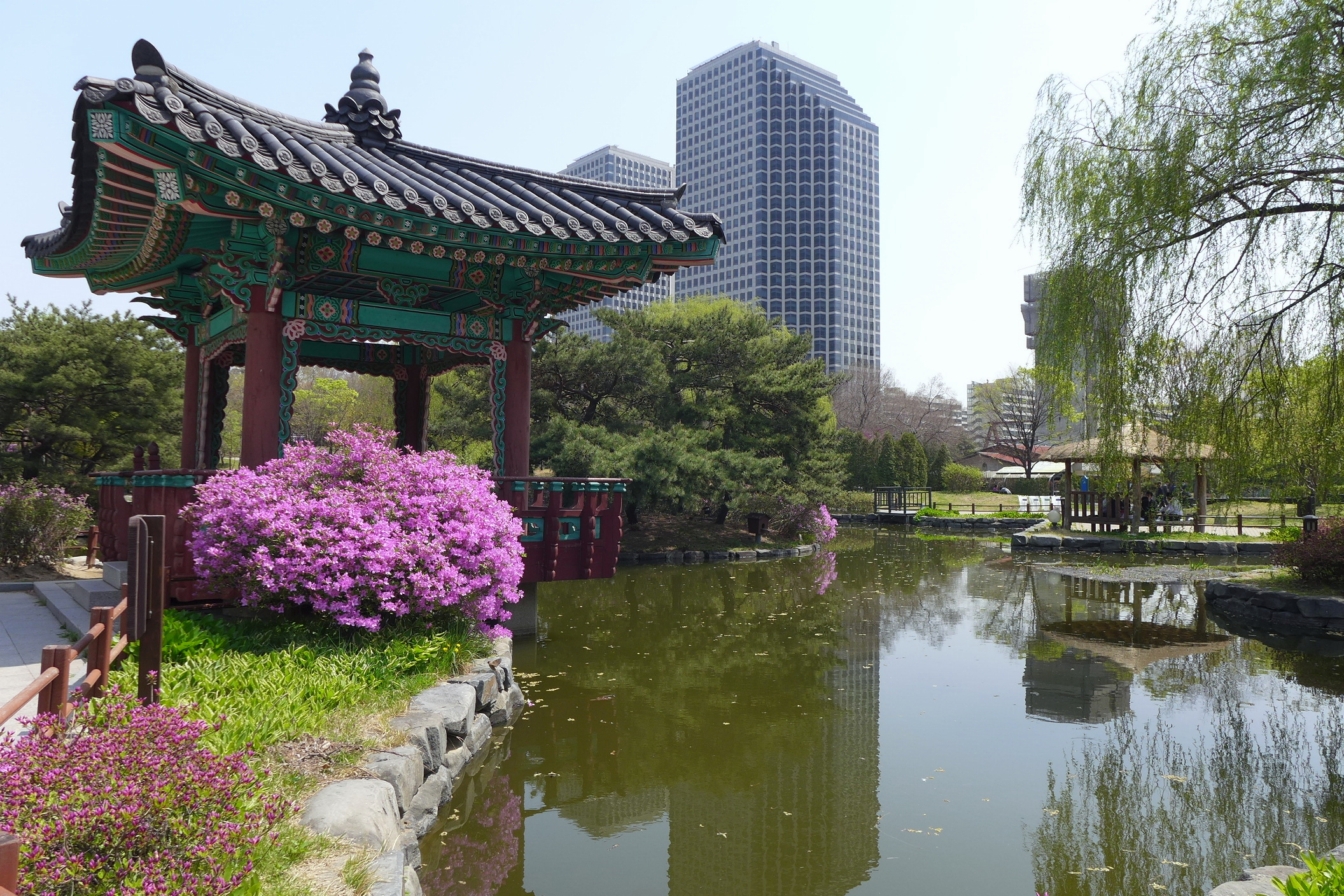 Yeouido Park